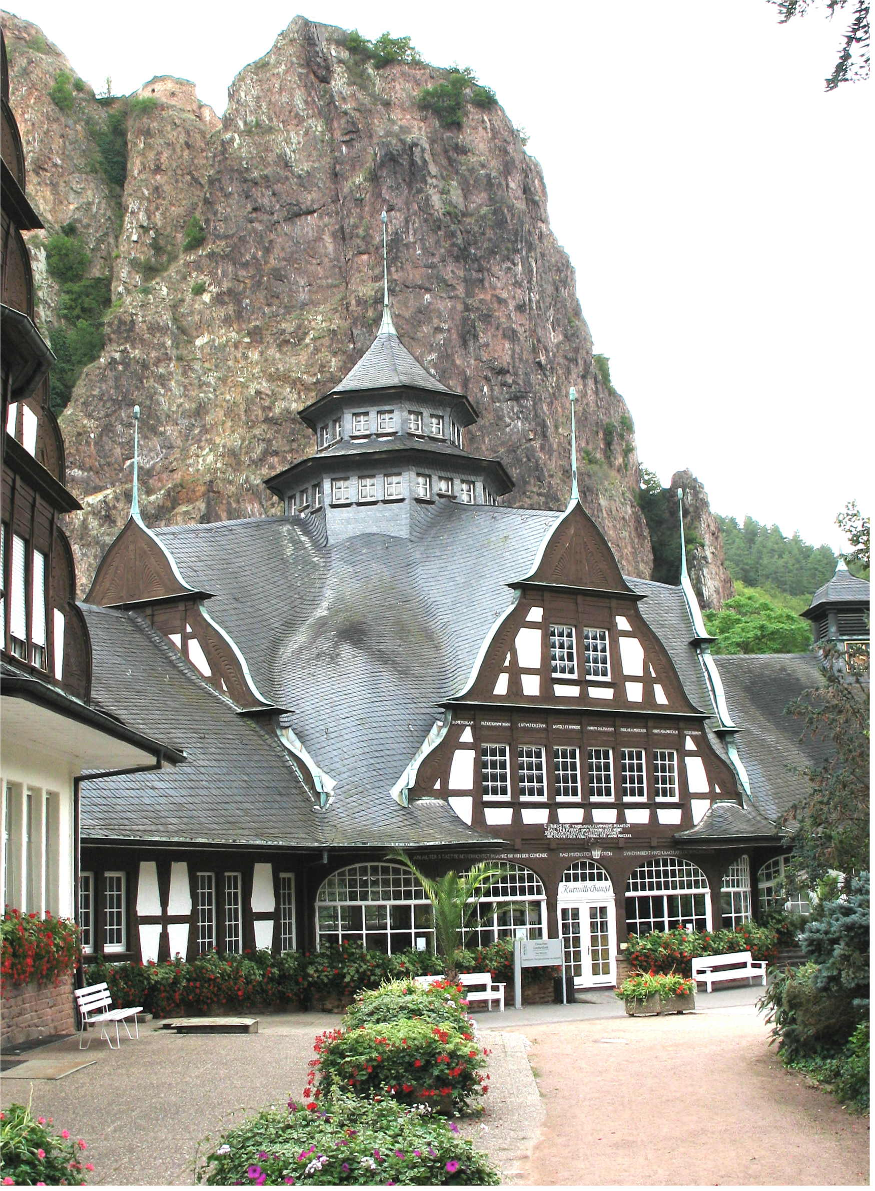 Kurhaus vu Bad Münster am Stein